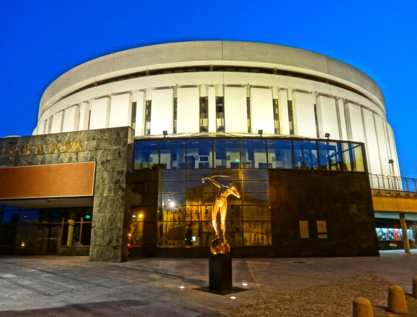 Łuczniczka Nova ustawiona przed Operą Nova w Bydgoszczy w 2013 roku